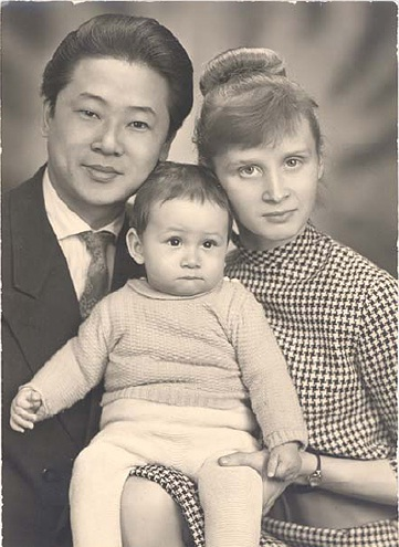 1961년 3월. 레나테 홍의 남편 홍옥근씨가 북한으로 소환되기 1달 전에 찍은 사진이다. 왼쪽부터 홍옥근, 아들 현철, 레나테 홍.